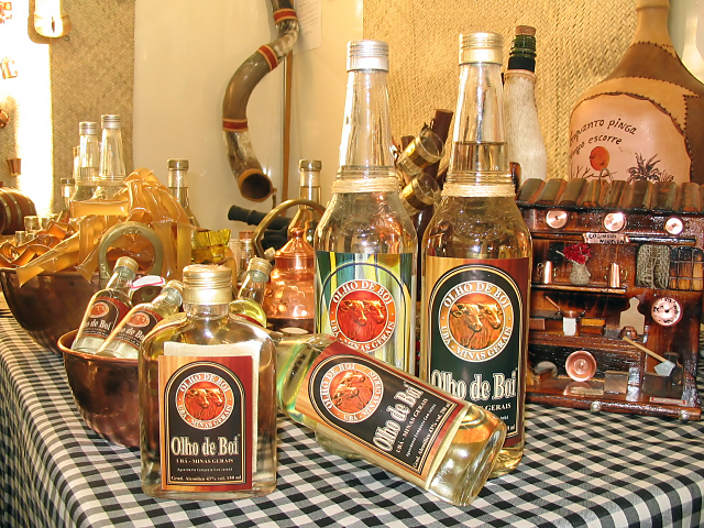 Cachaça Olho de Boi